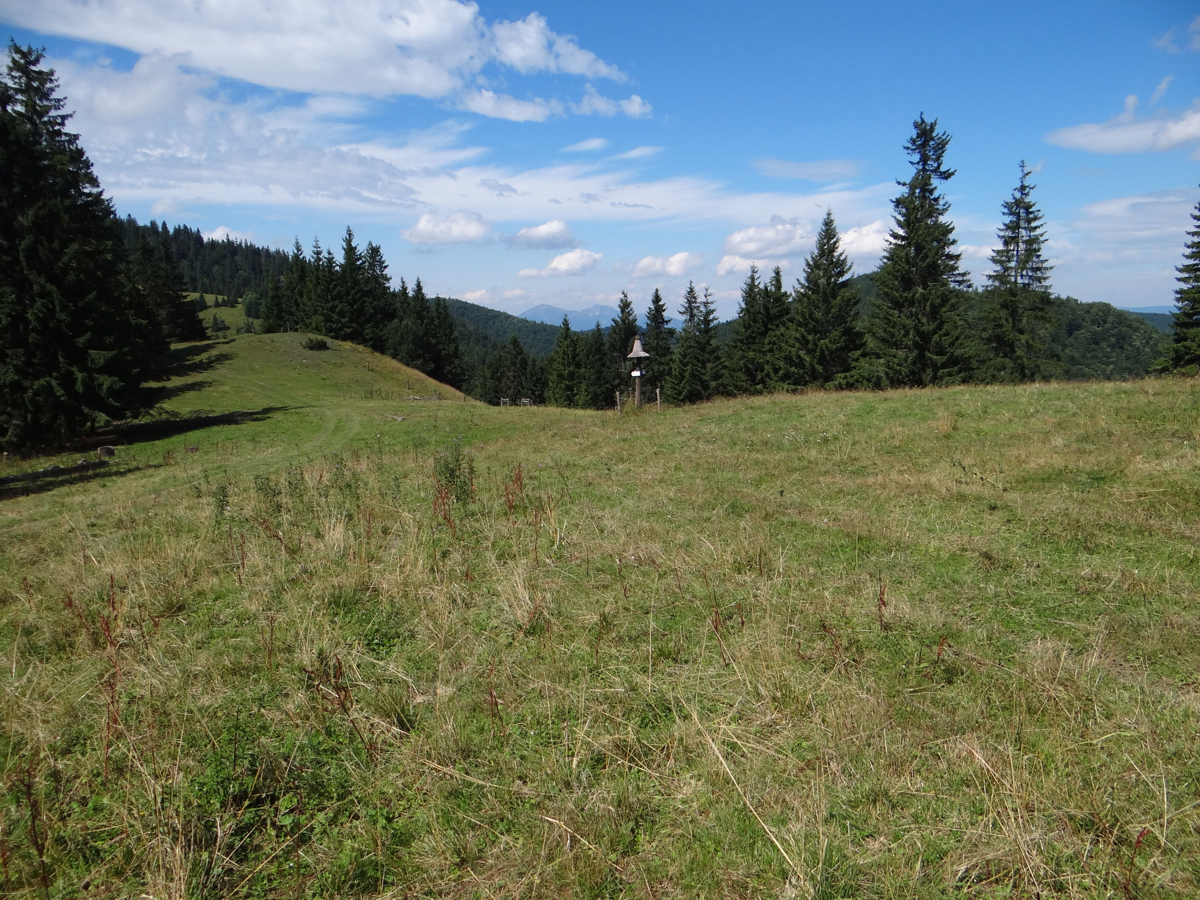 Chabzdová